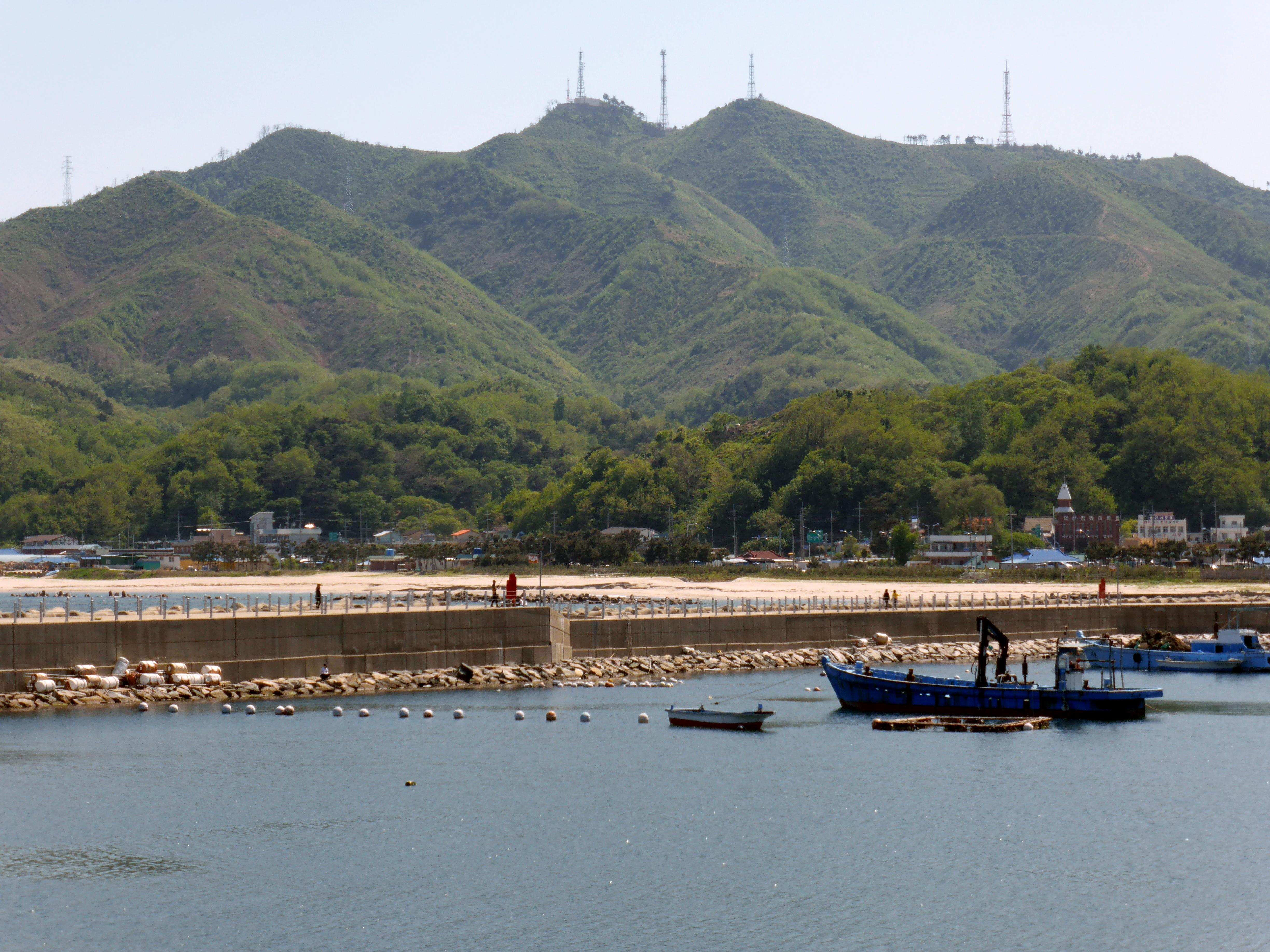 オサン港から見た縣鐘山